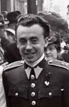 Ivan Hodáč, automobilový závodník